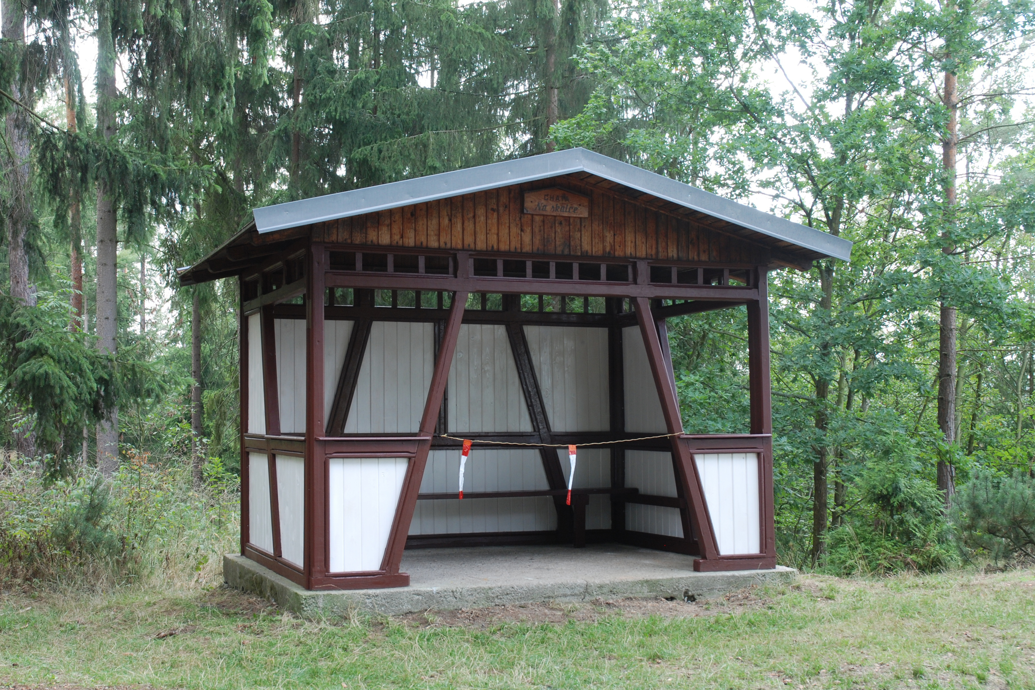 Chata Na Skalce v karlovarských lázeňských lesích